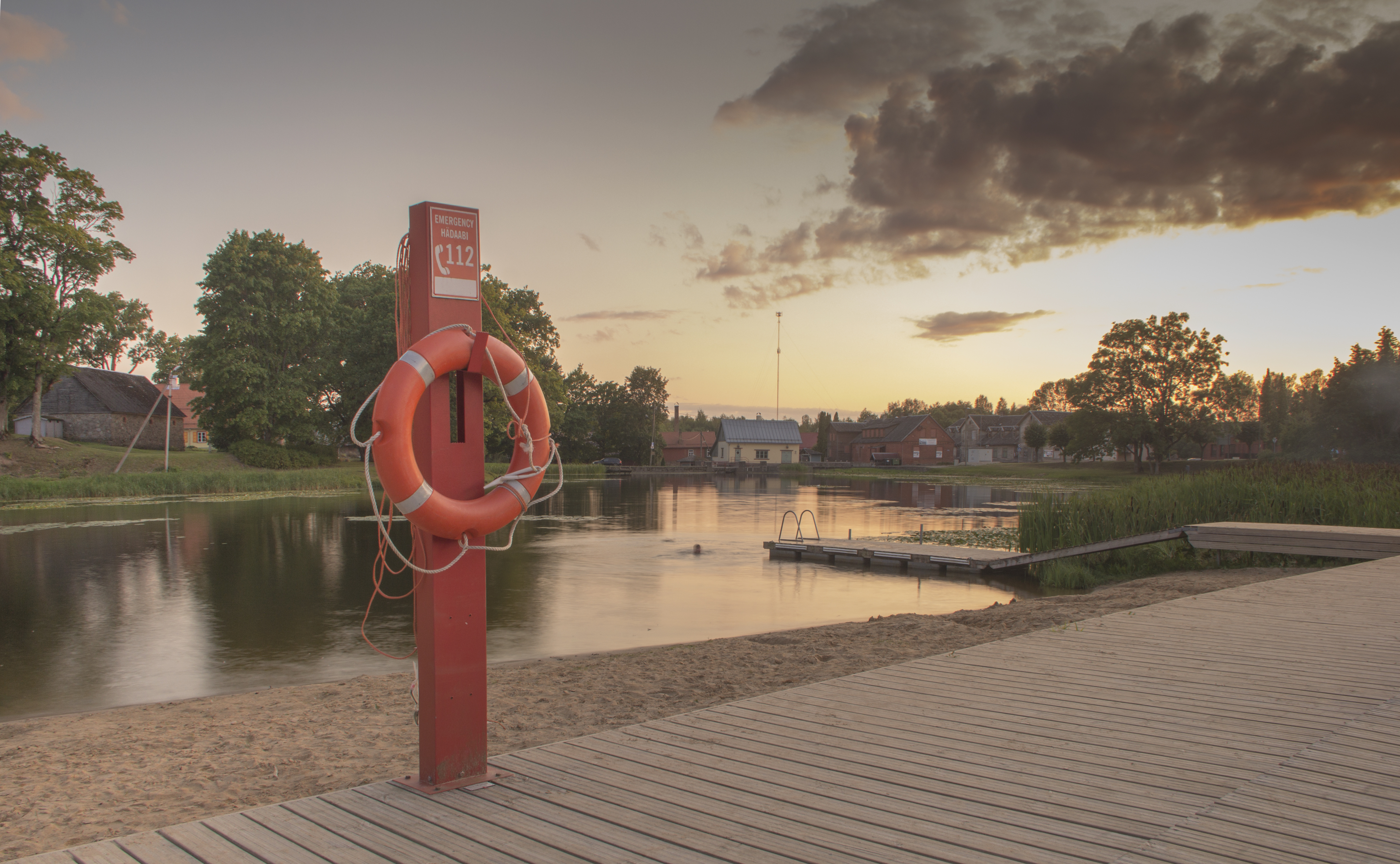 Suure-Jaani supluskoht.